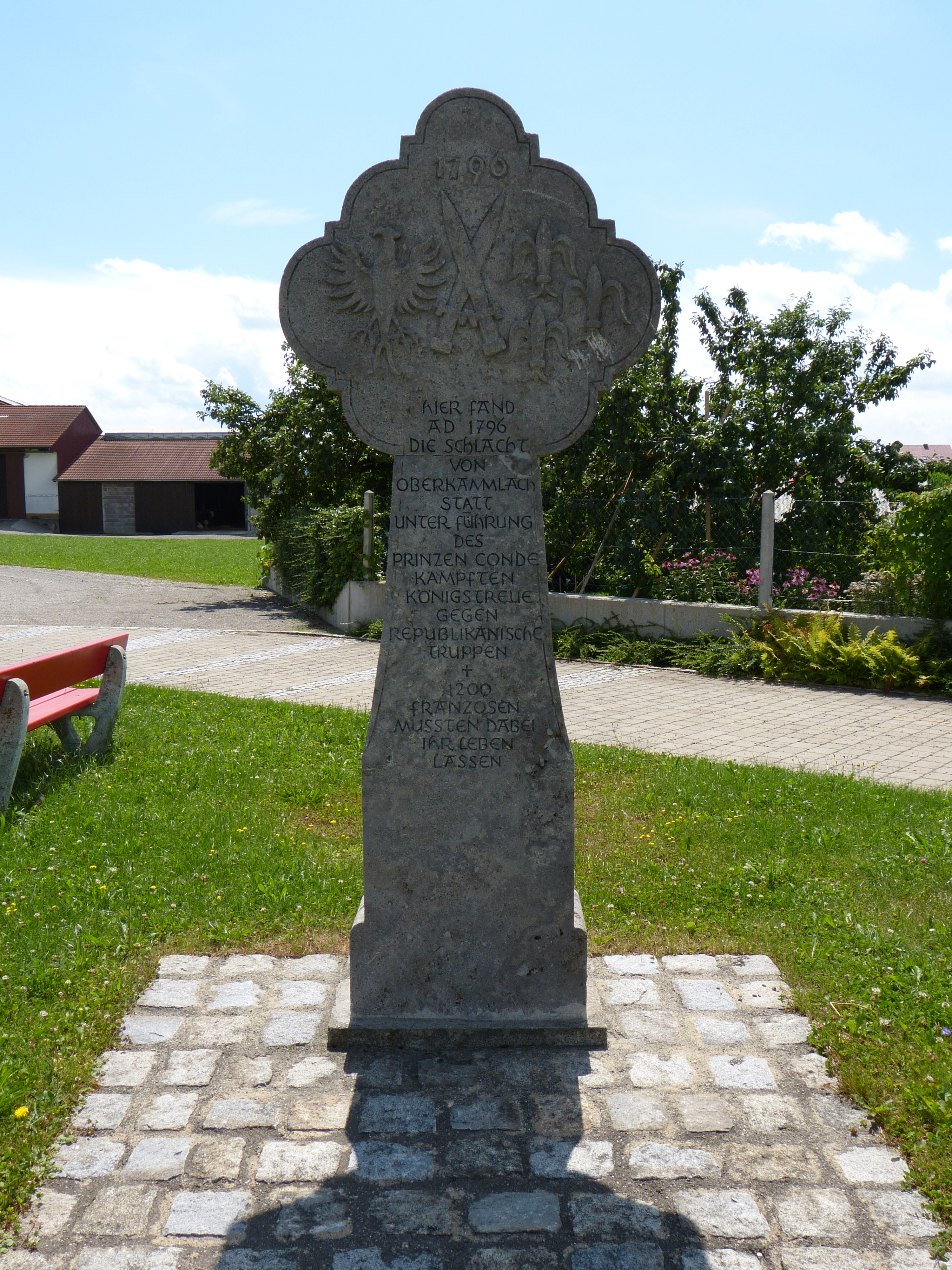 St. Joseph, Oberkammlach, Landkreis Unterallgäu, Bayern